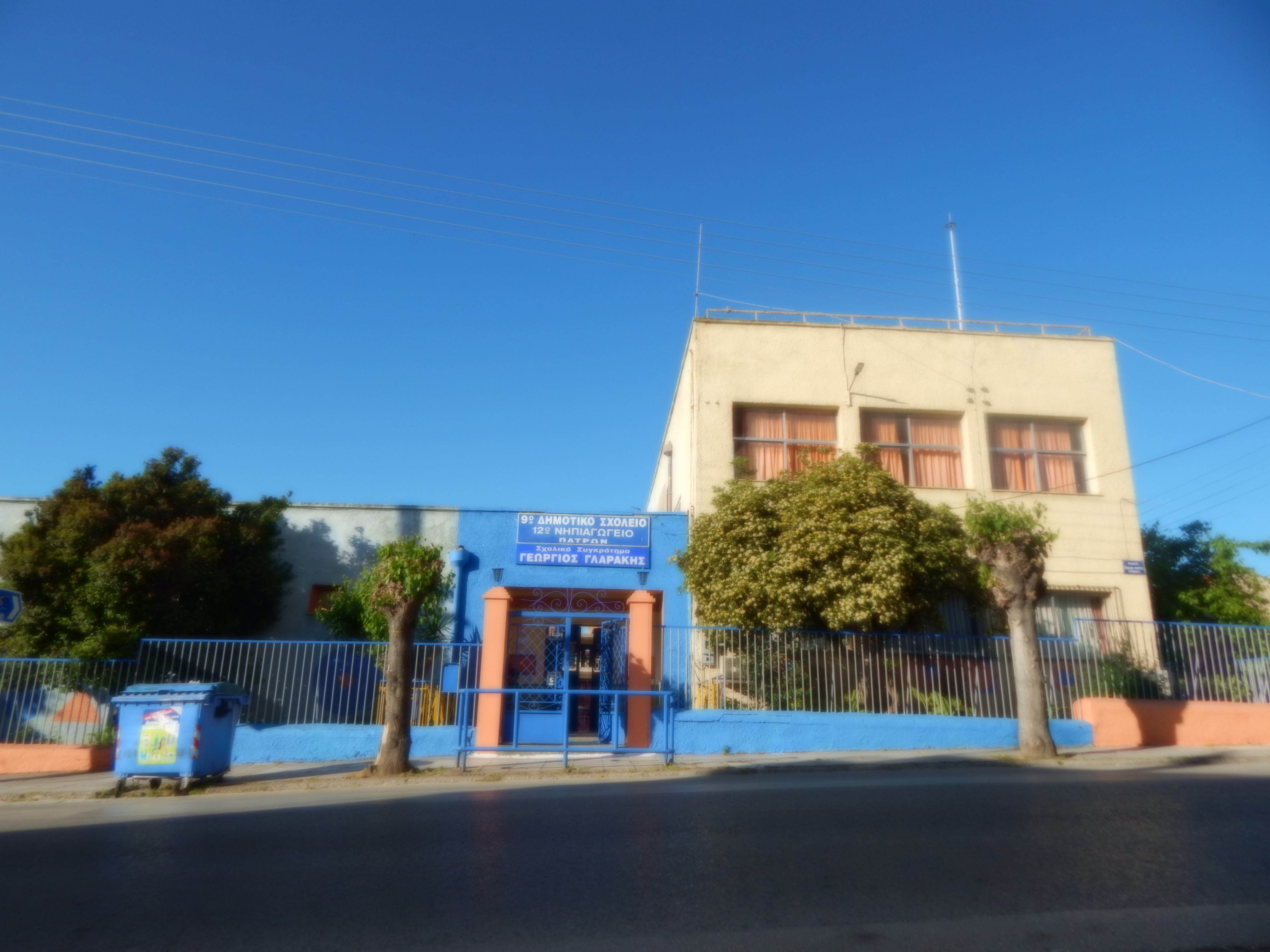 Ανέγερση σχολικού κτιρίου ,1931